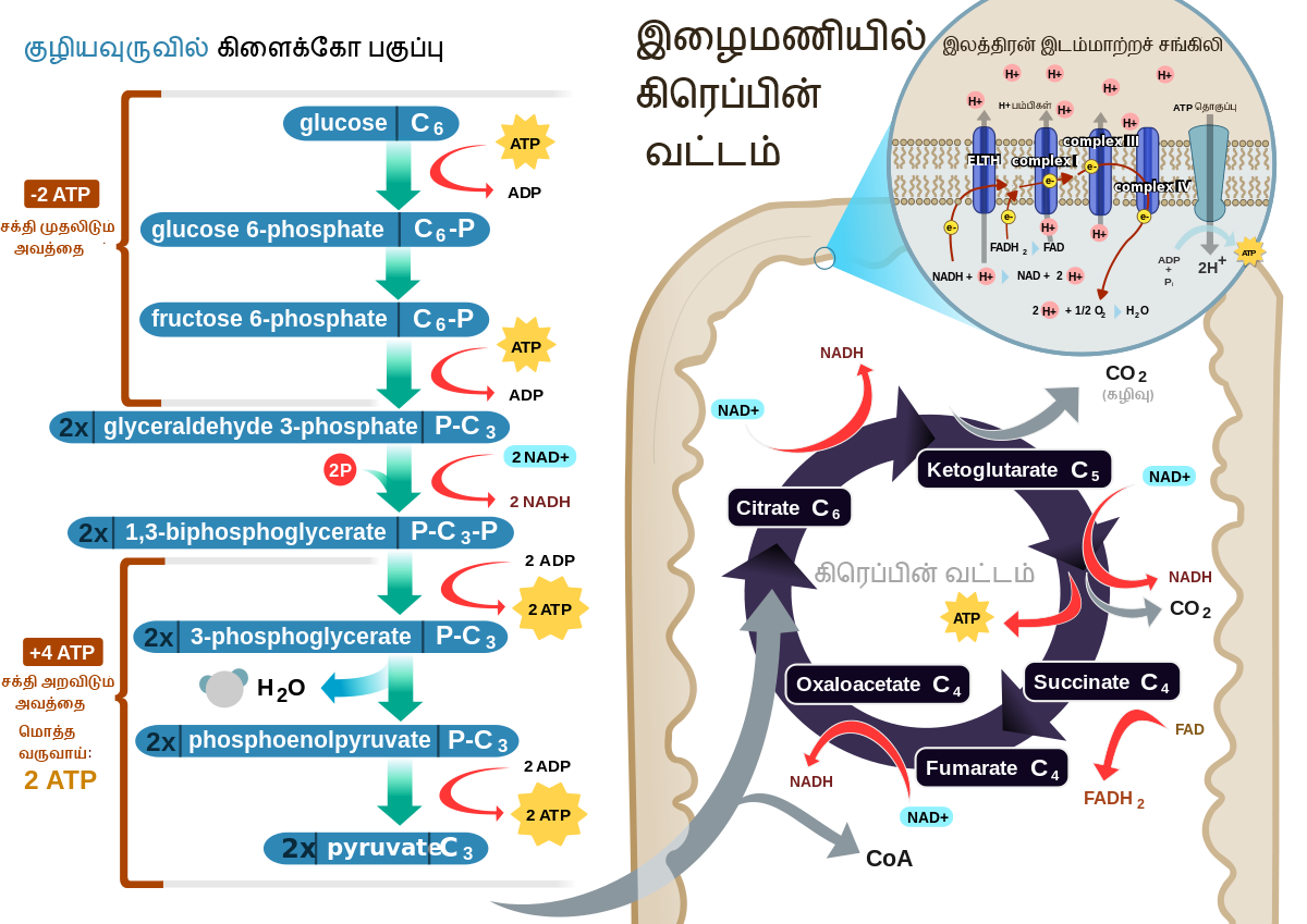 கலச் சுவாசம்